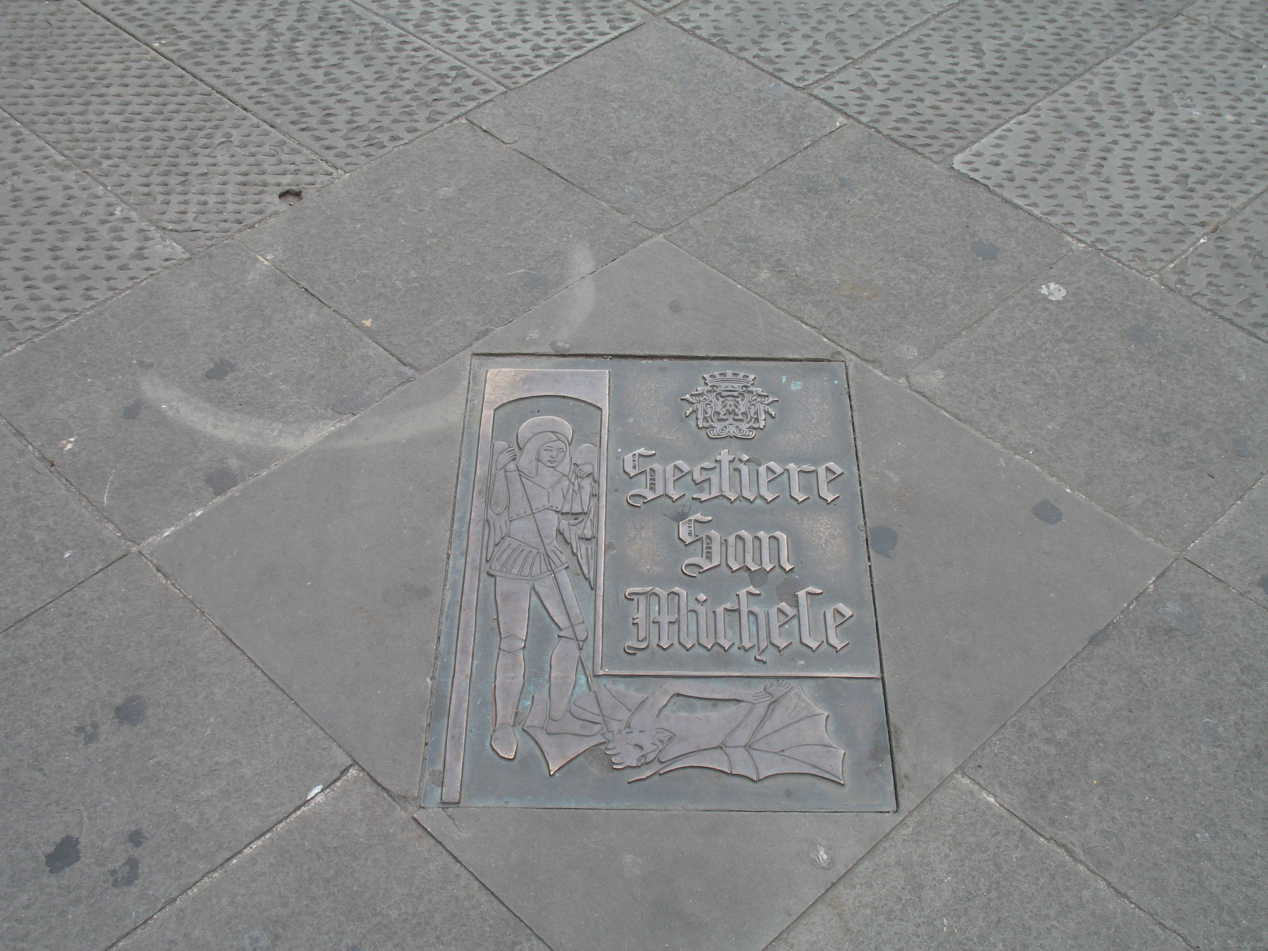 Serie di Immagini da Rapallo e San Michele di Pagana (Rapallo), in provincia di Genova